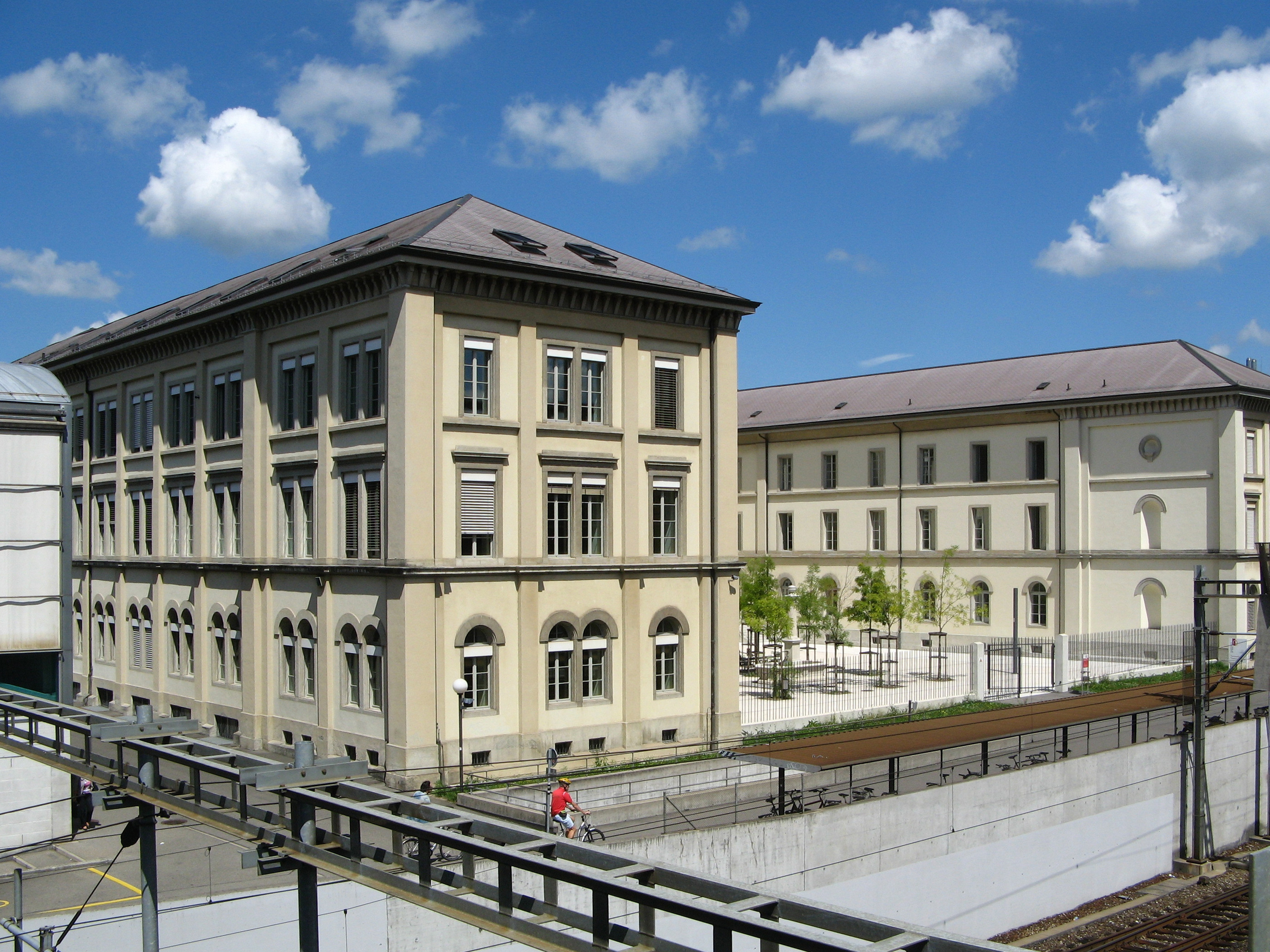 Pestalozzischulhaus in Aarau